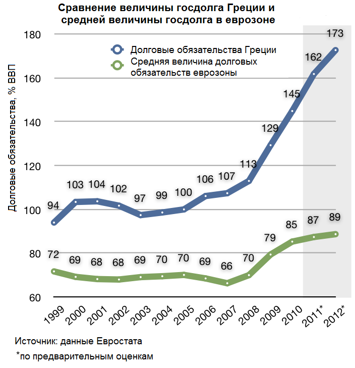 Хронология изменения величины госдолга Греции с 1999 по 2010 г.